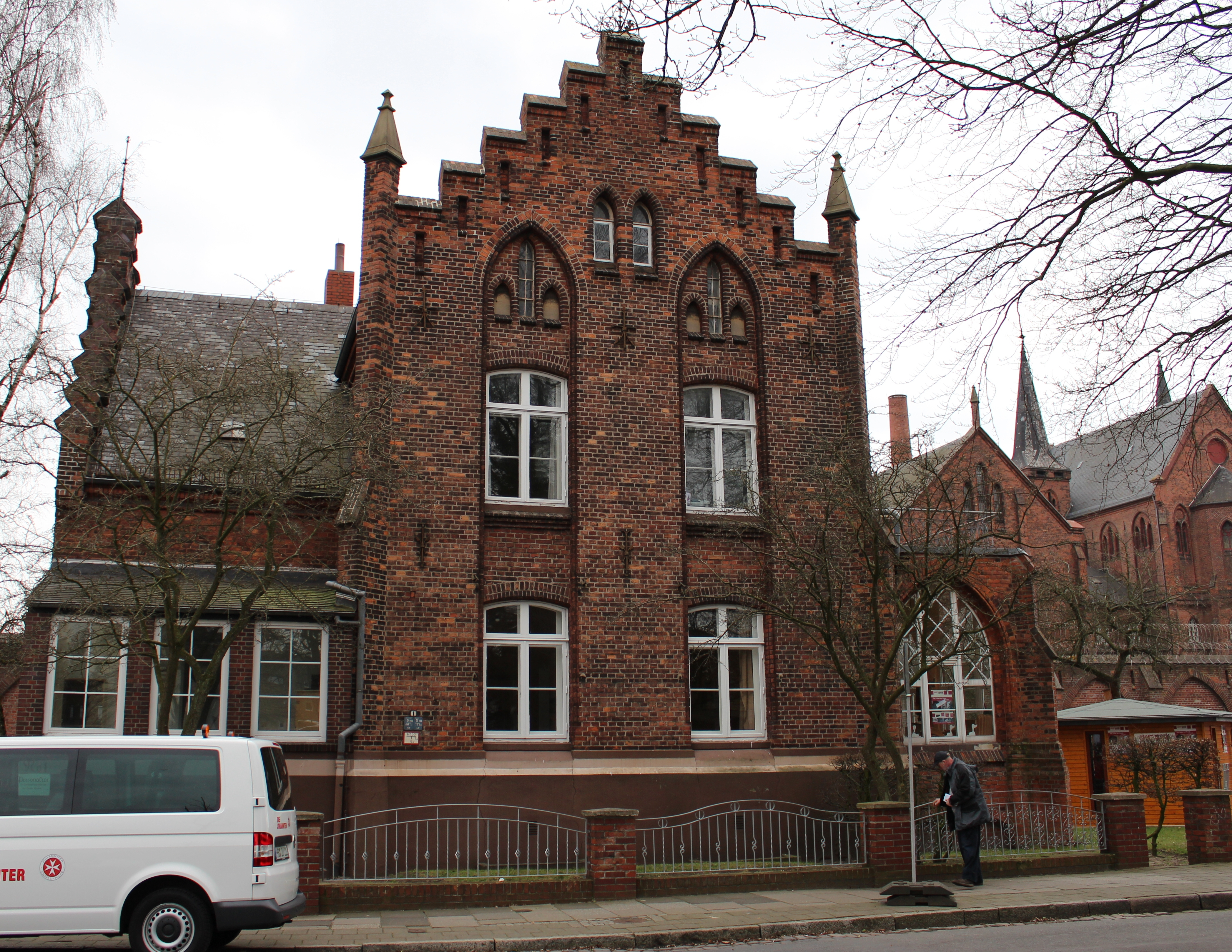 Strafanstalt Oslebshausen, Direktorenwohnhaus, Justizvollzugsanstalt Oslebshausen in Bremen, Sonnemannstraße 1. Das abgebildete Objekt ist ein geschütztes Kulturdenkmal in der Freien Hansestadt Bremen, mit der Nr. 1343 beim Landesamt für Denkmalpflege registriert.